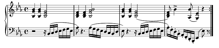 Extracto de la Sonata para piano Opus 27 nº 1 de Ludwig van Beethoven